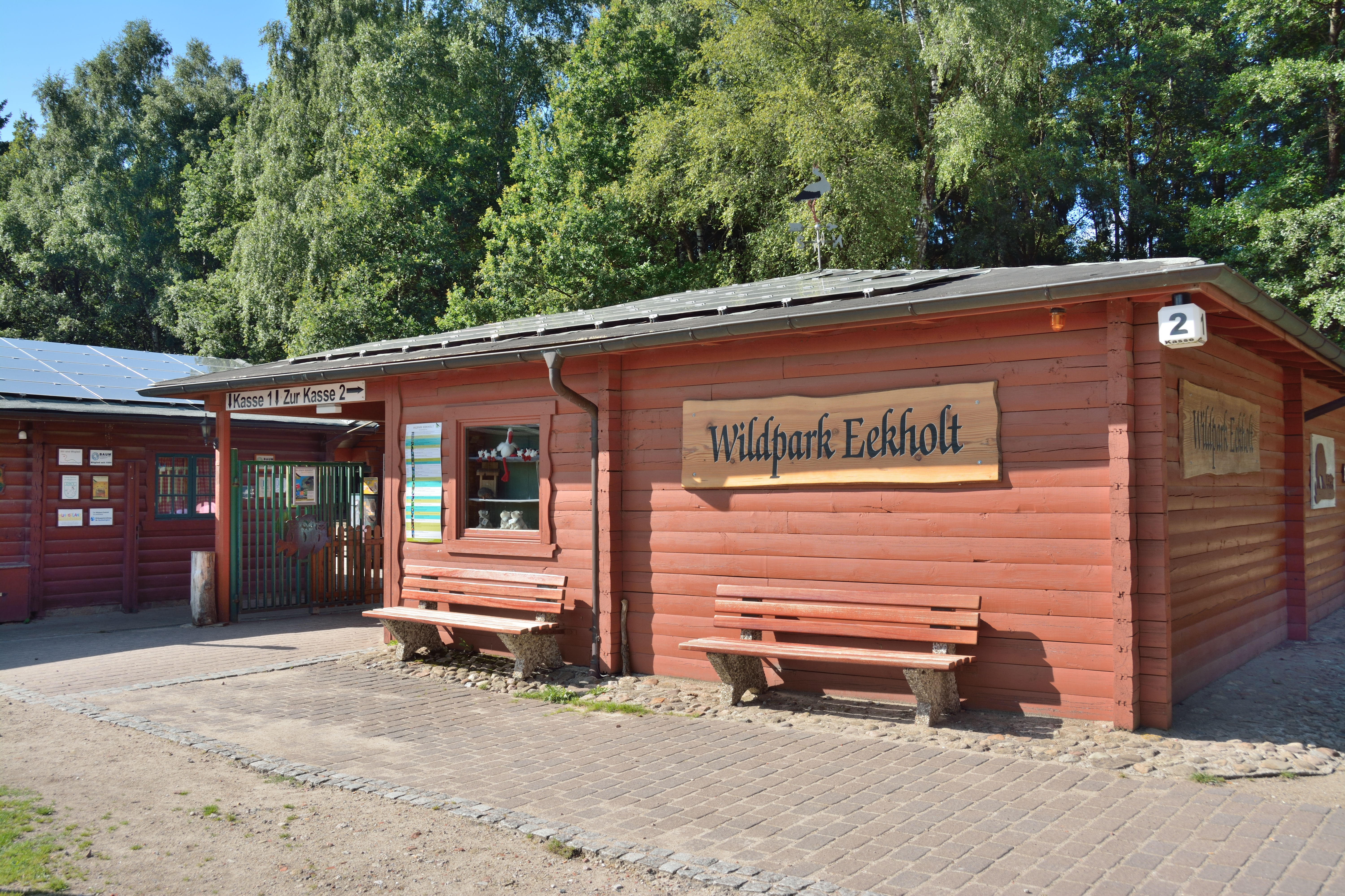 Wilpark Eekholt 2013